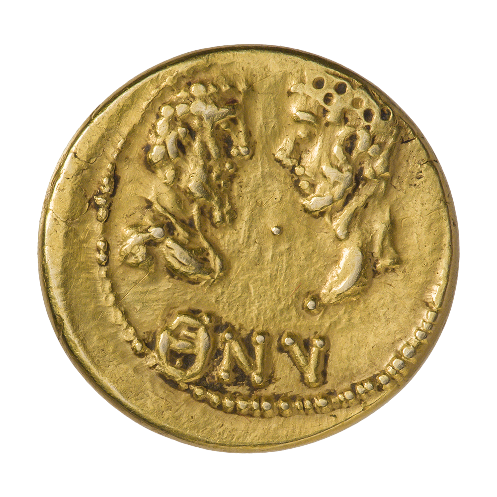 Боспорское царство. Евпатор (154—170). Статер. Ок. 162 г. Реверс. Голова Марка Аврелия напротив Луция Вера, между ними точка; внизу буквы ΘNY. Точечный ободок.